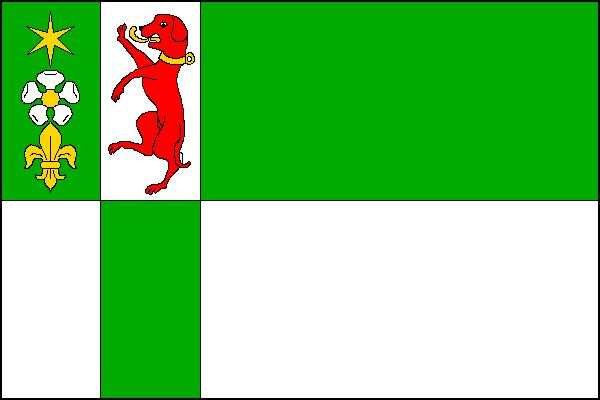 Vlajka obce Křimov